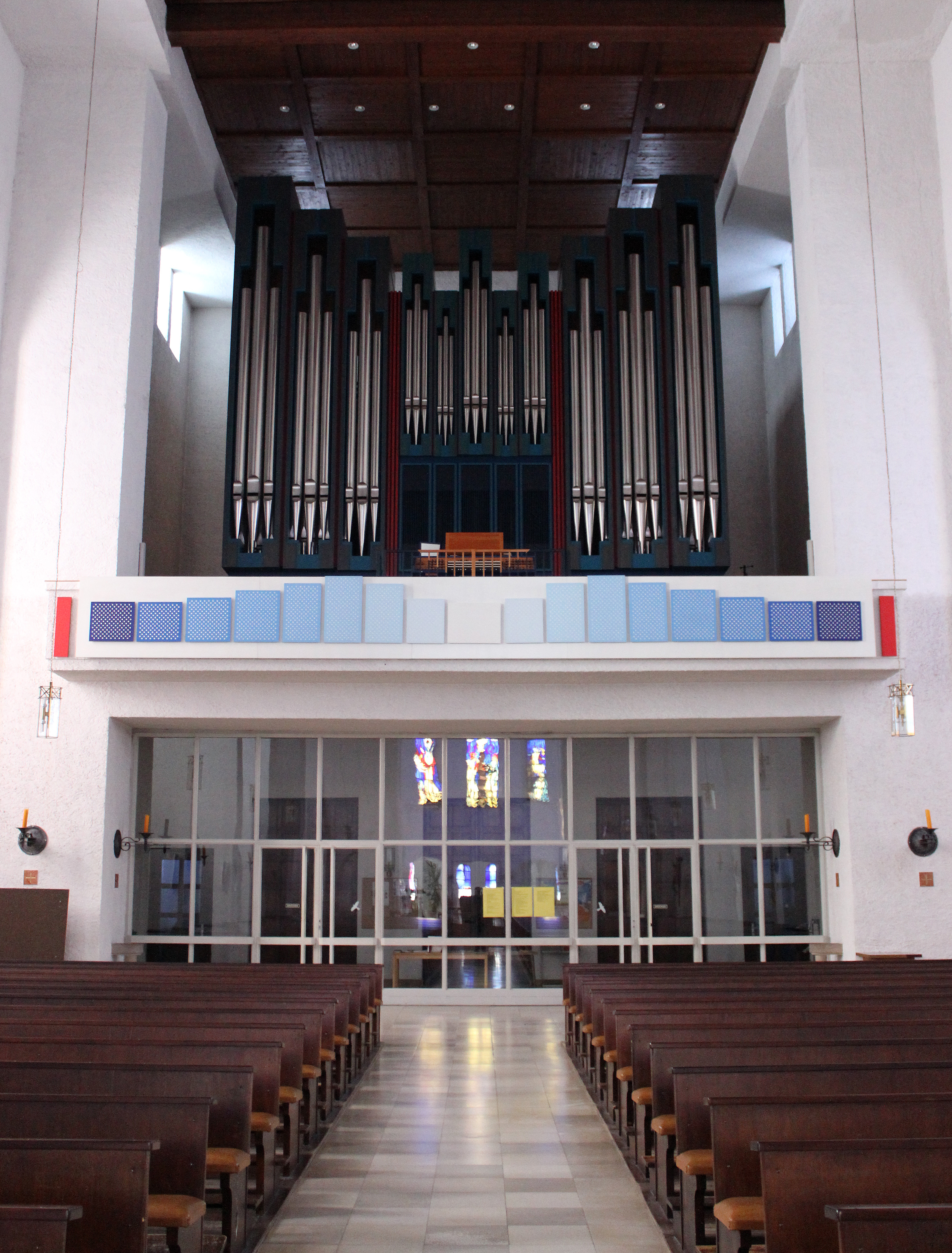 Blick ins Innere der katholischen Pfarrkirche Heilig Kreuz in Zweibrücken, Rheinland-Pfalz.